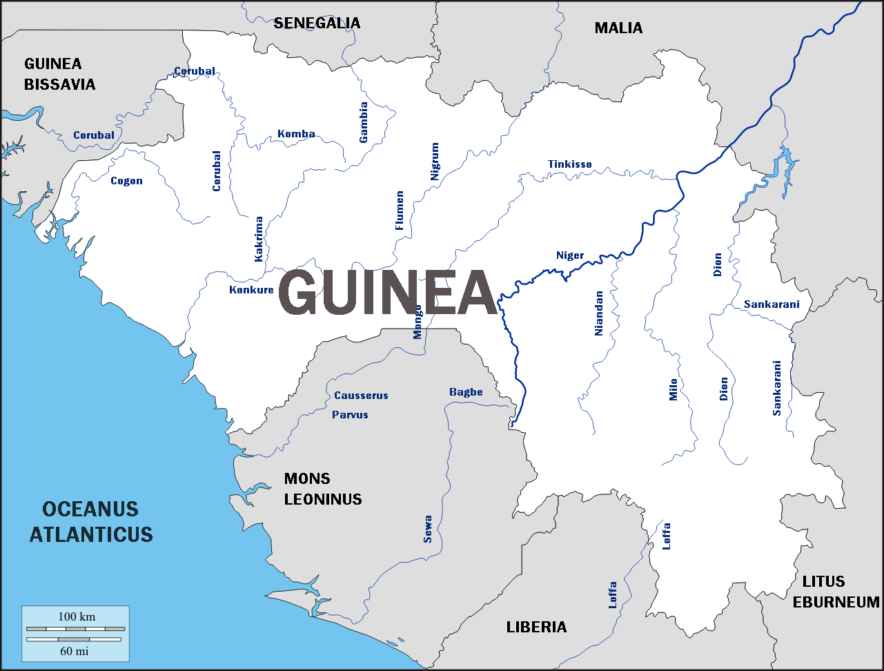 Praecipua Guineae flumina